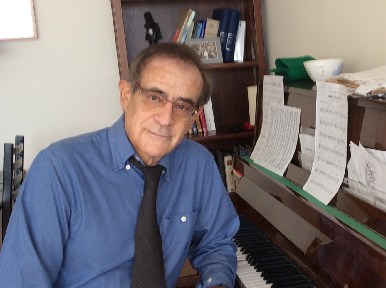 Profesor Javier Roiz en Madrid en 2016.